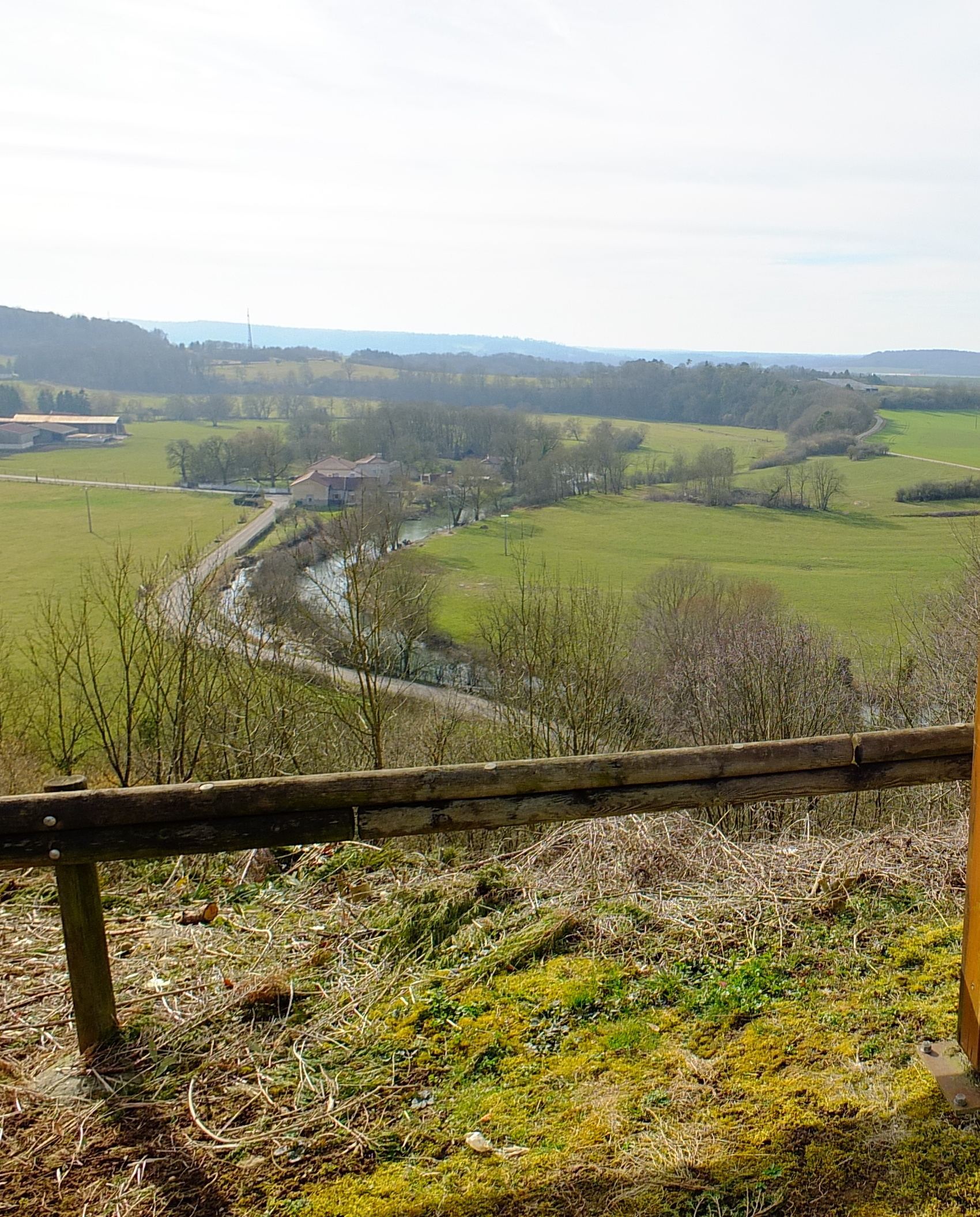 vue panoramique depuis l'église Saint-Elophe Photo prise pendant une randonnée sur le GR de Pays de l'Ouest des Vosges (Topo-guide(r) FFRandonnée)